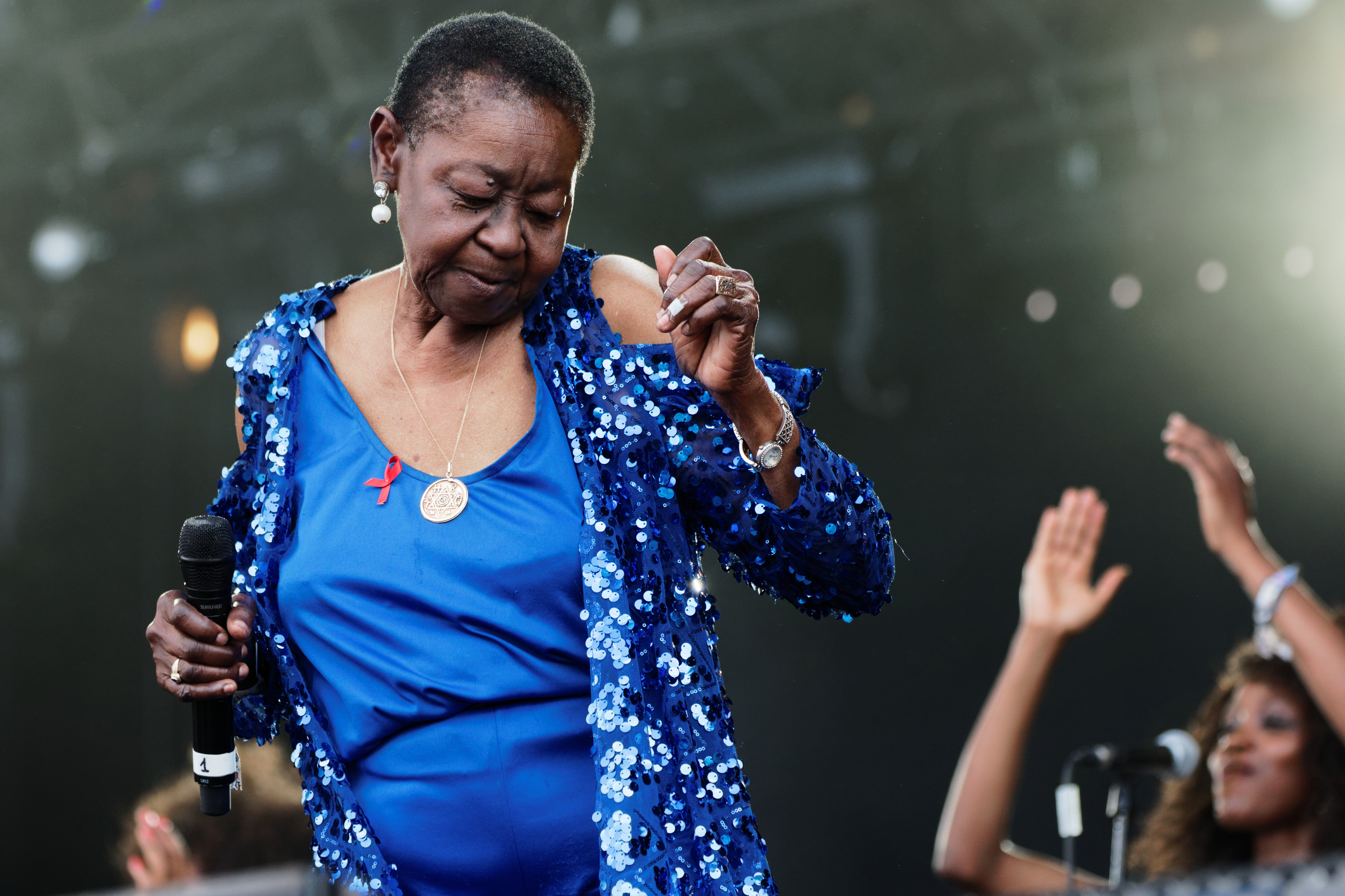 Calypso Rose en concert lors du festival des vieilles charrues 2016.